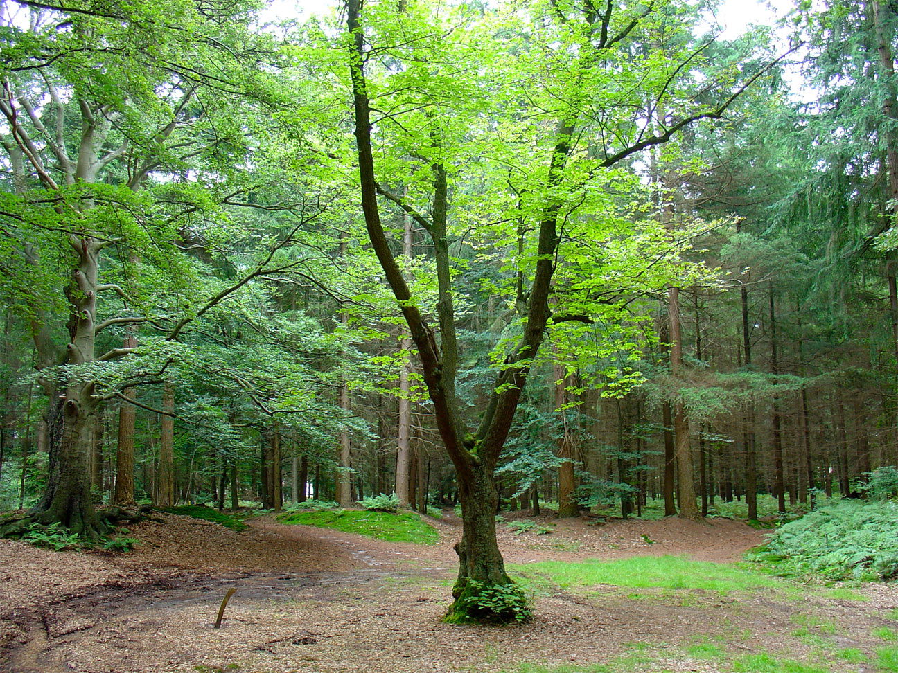 Het Sterrebosch in het landgoed Westerbeeksloot in Frederiksoord met linde uit circa 1700